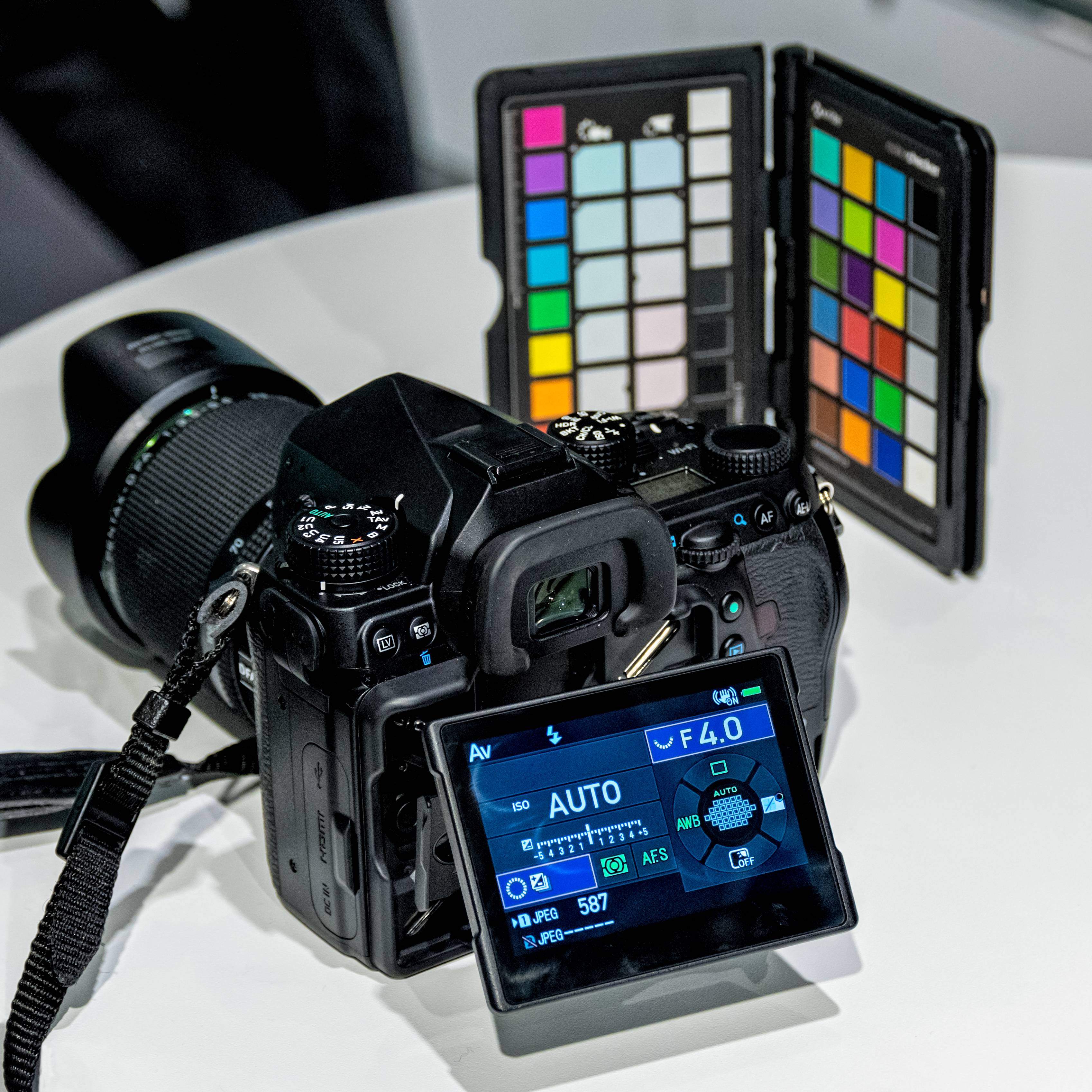 Die Kleinbildkamera Pentax K-1. Diese Kamera wurde am 16.03.2016 in Freiburg bei Ringfoto Löffler von Pentax vorgeführt. Es ist die endgültige Hardware, allerdings mit der Firmwareversion 0.48. Die Optik ist das neue 28-105 Zoom von Pentax Vielen Dank für die Photografiererlaubnis im Geschäft.